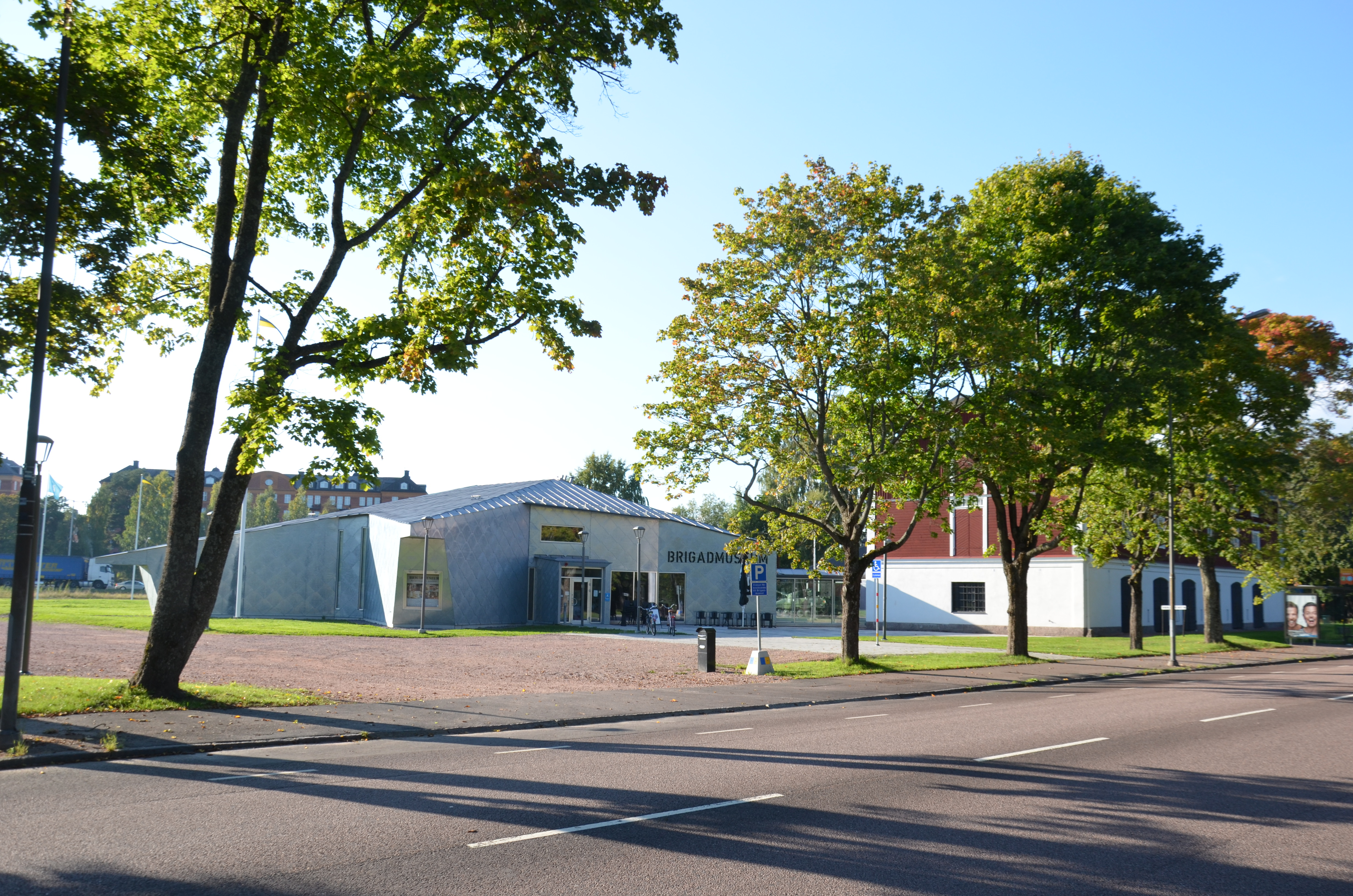 Brigadmuseum i Vaermland, Karlstad. Byggnadsår 2012. Arkitekter: Murman arkitekter